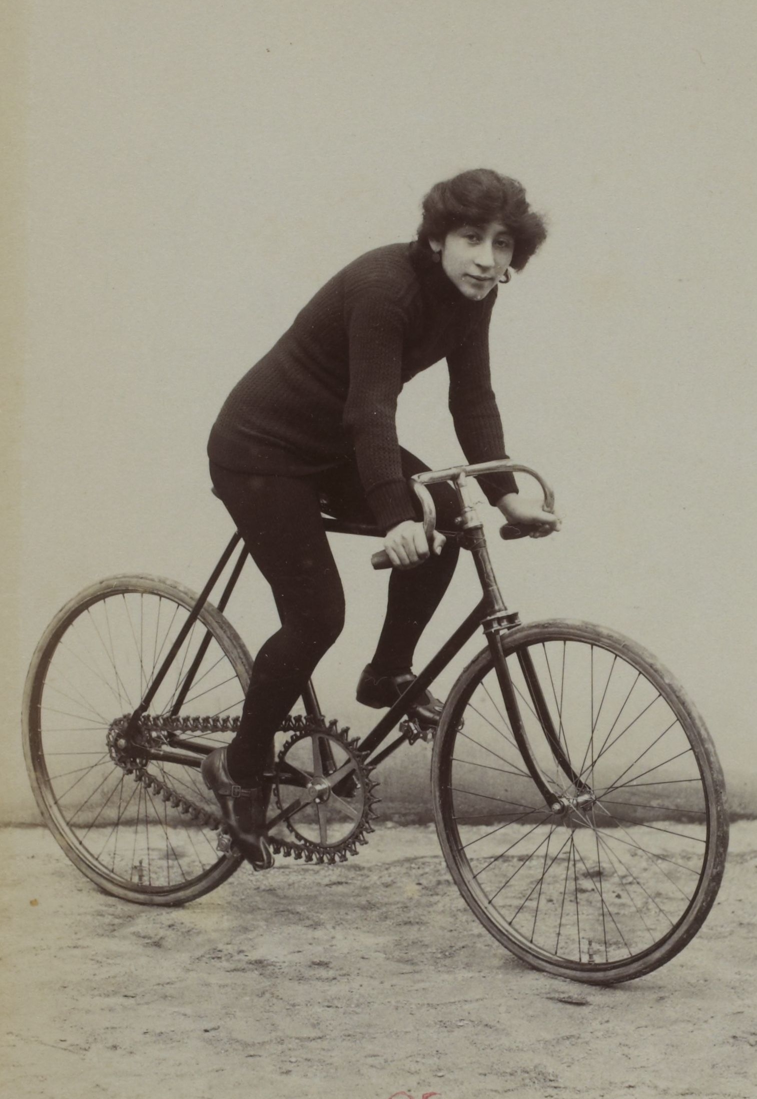 Mlle. Aboukaïa [Collection Jules Beau. Photographie sportive] : T. 4. Années 1896 et 1897 / Jules Beau : F. 34. Aboukaïa ; Reillo